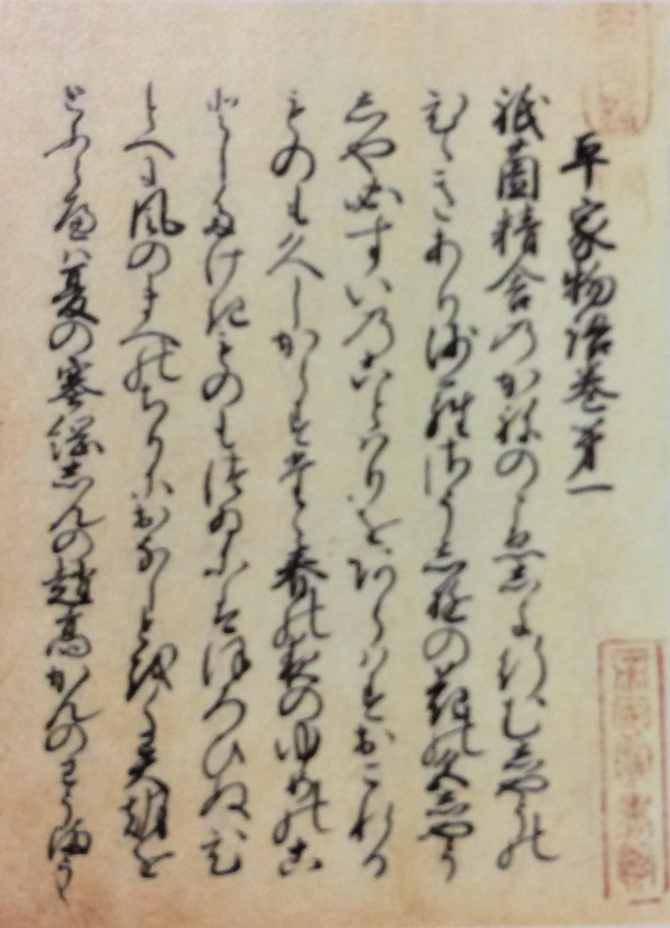 国立国会図書館所蔵 鎌倉時代の信濃前司行長による創作か